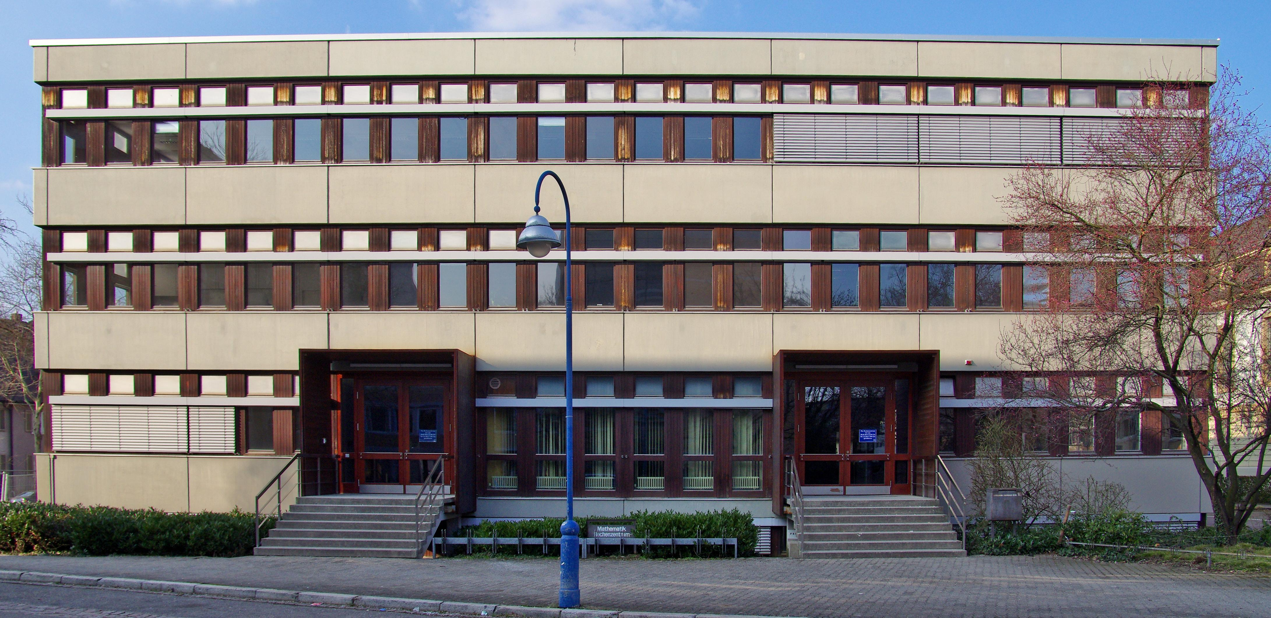 Black Forest Grid im Rechenzentrum der Mathematischen Fakultät der Uni Freiburg